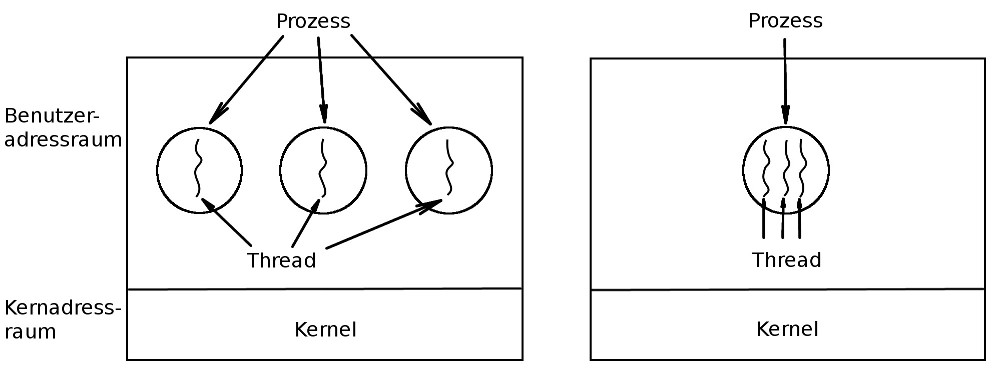 Drei Prozesse mit einem Thread und ein Prozess mit drei Threads Nach Andrew S. Tanenbaum, Moderne Betriebssysteme, 3. Aufl. 2009, S. 2009